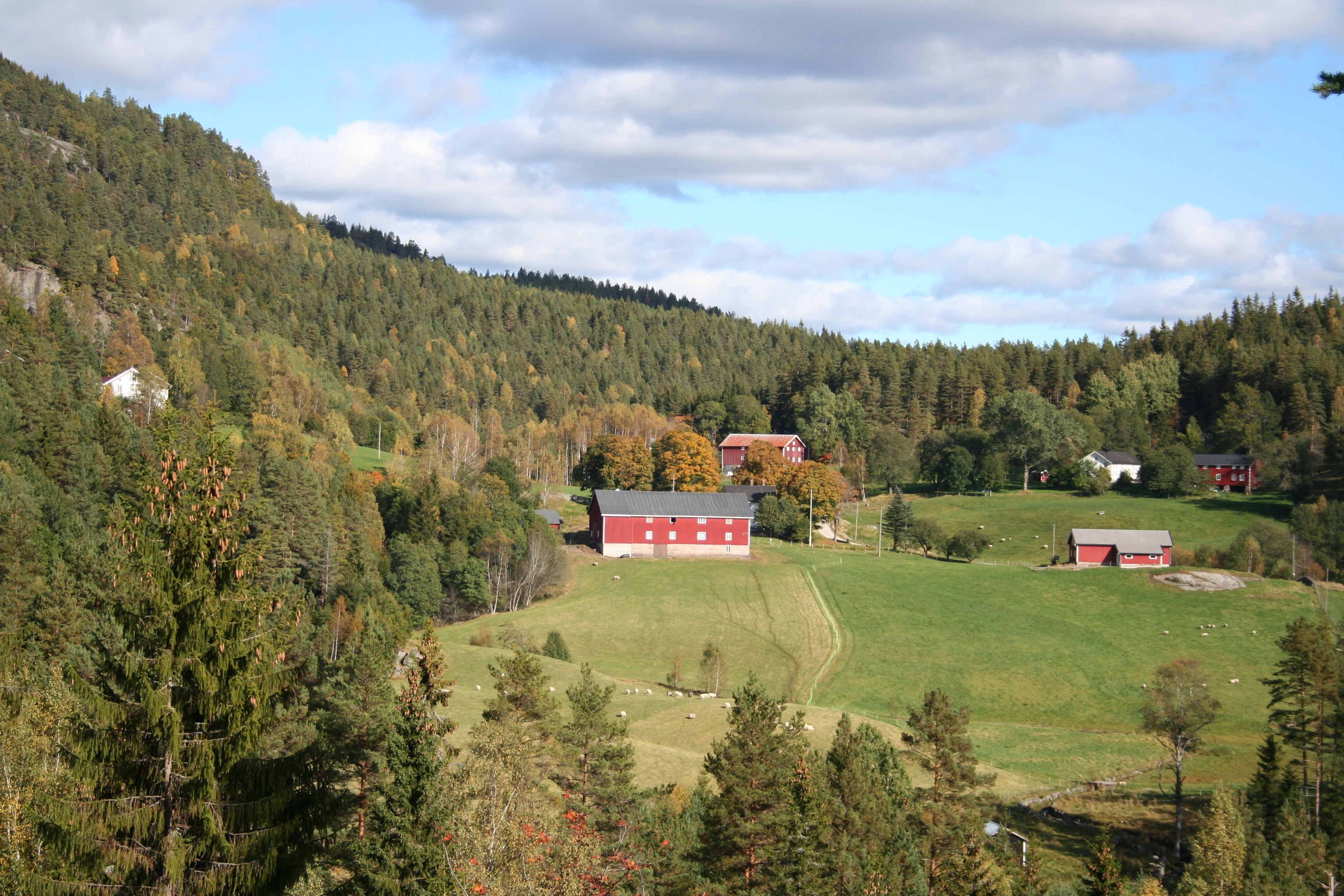 Eppeland - Ei gårdsgrend i Åmli kommune